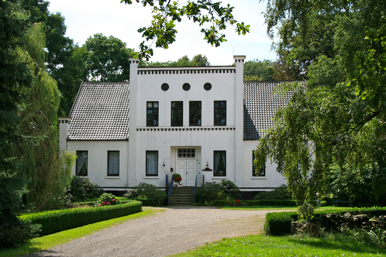 Widdergut Vier Eichen entworfen von Laves, Argestorf, Wennigsen (Deister)